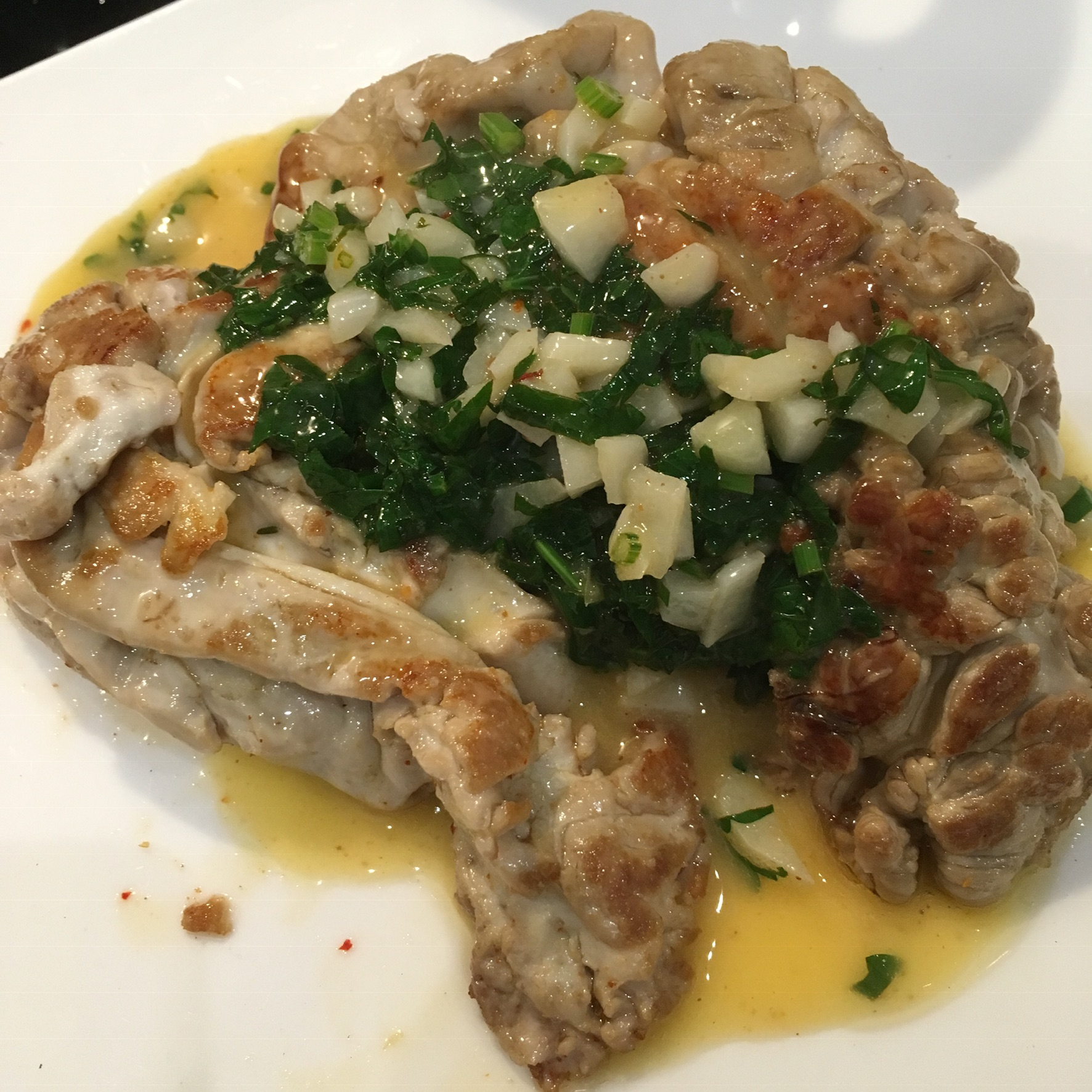 Gewässert, pochiert, meliert, in Butter gebraten und mit Nussbutter, Petersilie, Zitrone und Knoblauch serviert